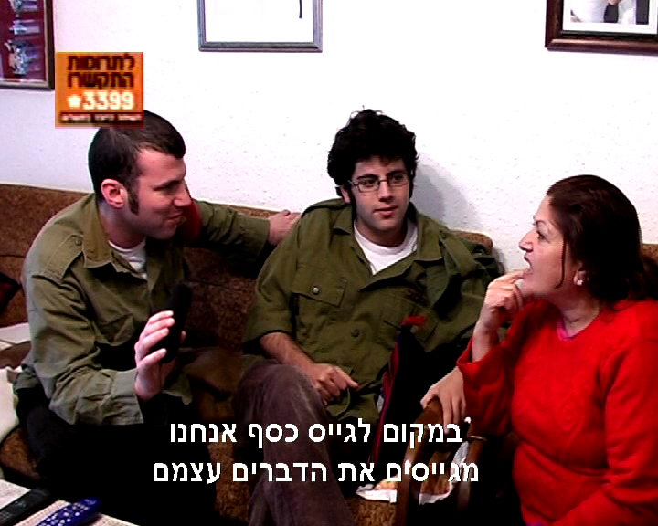 הסרט שירותרום מאת, בבימויים ובכיכובם של יוסי עטיה ואיתמר רוז